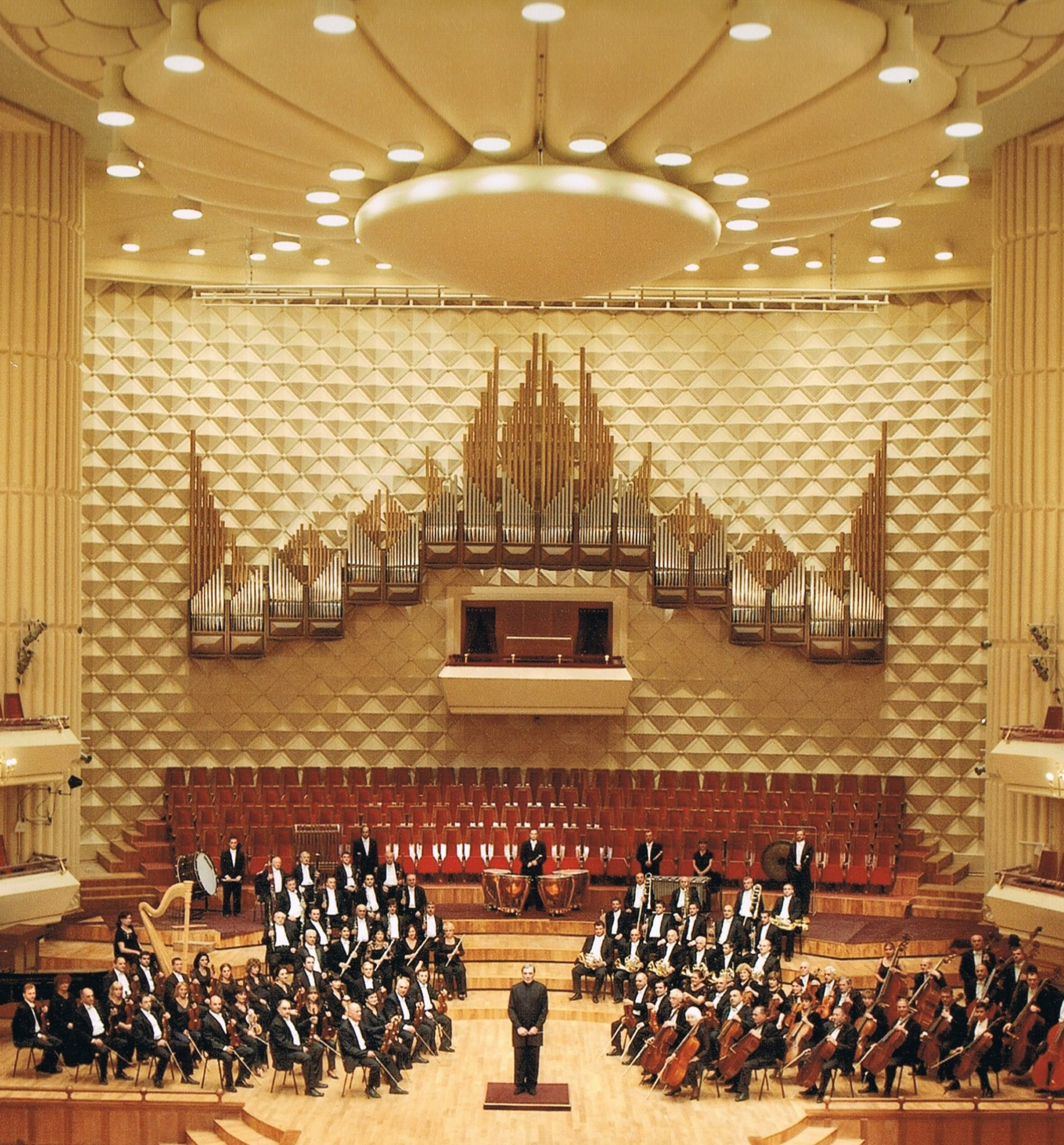 Die Kienle-Orgel im Djansug Kakhidze Tbilisi Centre for Music and Culture in Georgiens Hauptstadt ist die größte Resonatorenorgel der Welt.